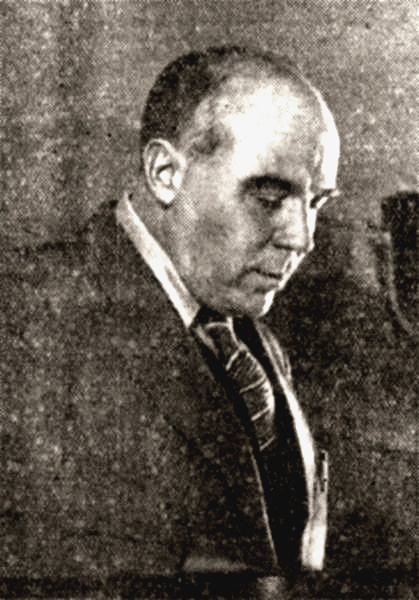 Фотография наркома финансов СССР Г. Ф. Гринько (1890–1938)